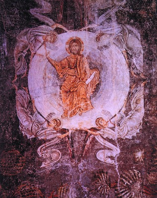 Вознесение Господне. Роспись ц. Св. Софии в Охриде (Македония). 40-е гг. XI в.